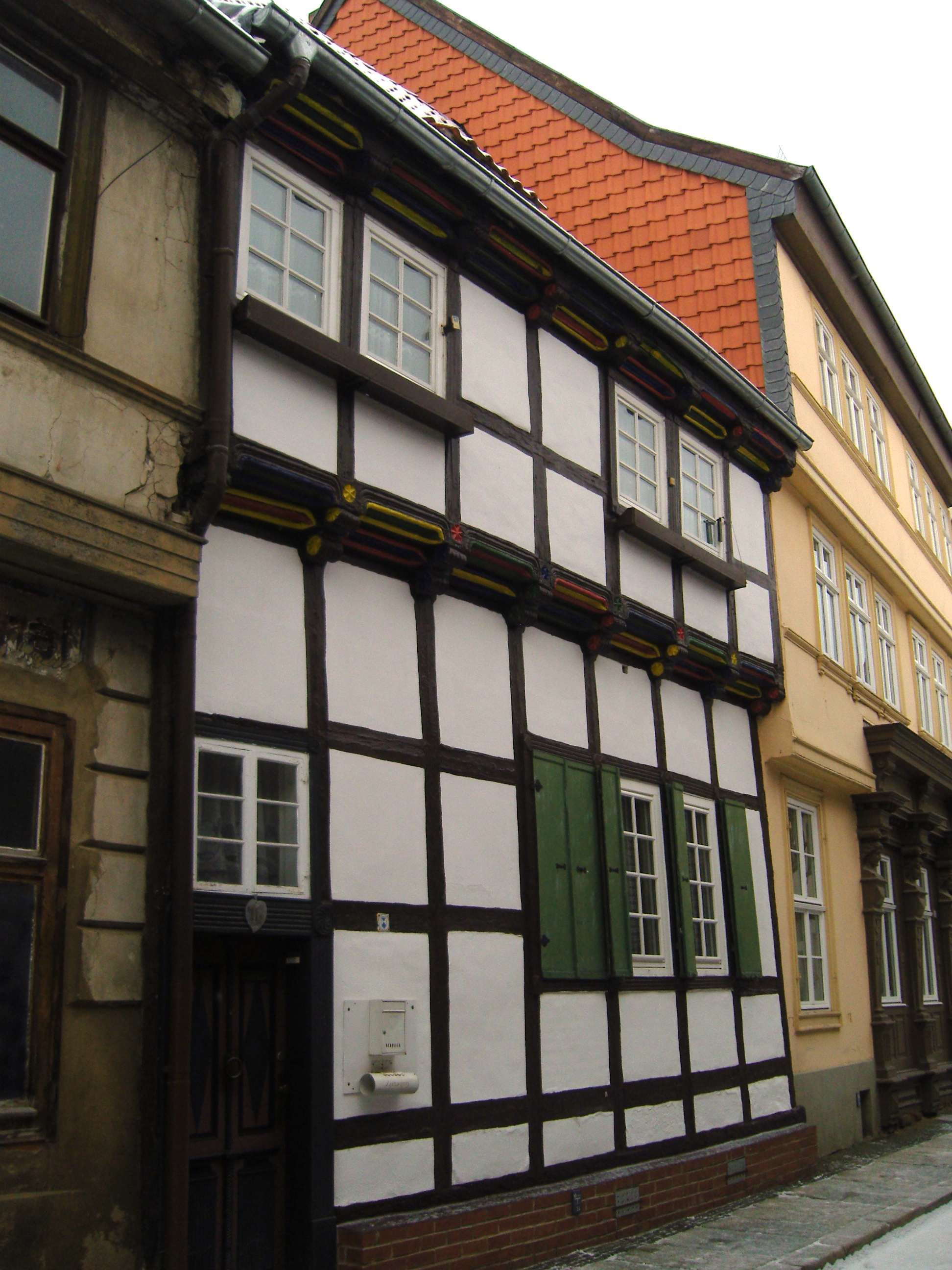 Denkmalgeschütztes Wohnhaus in der Straße Stieg 18 in Quedlinburg